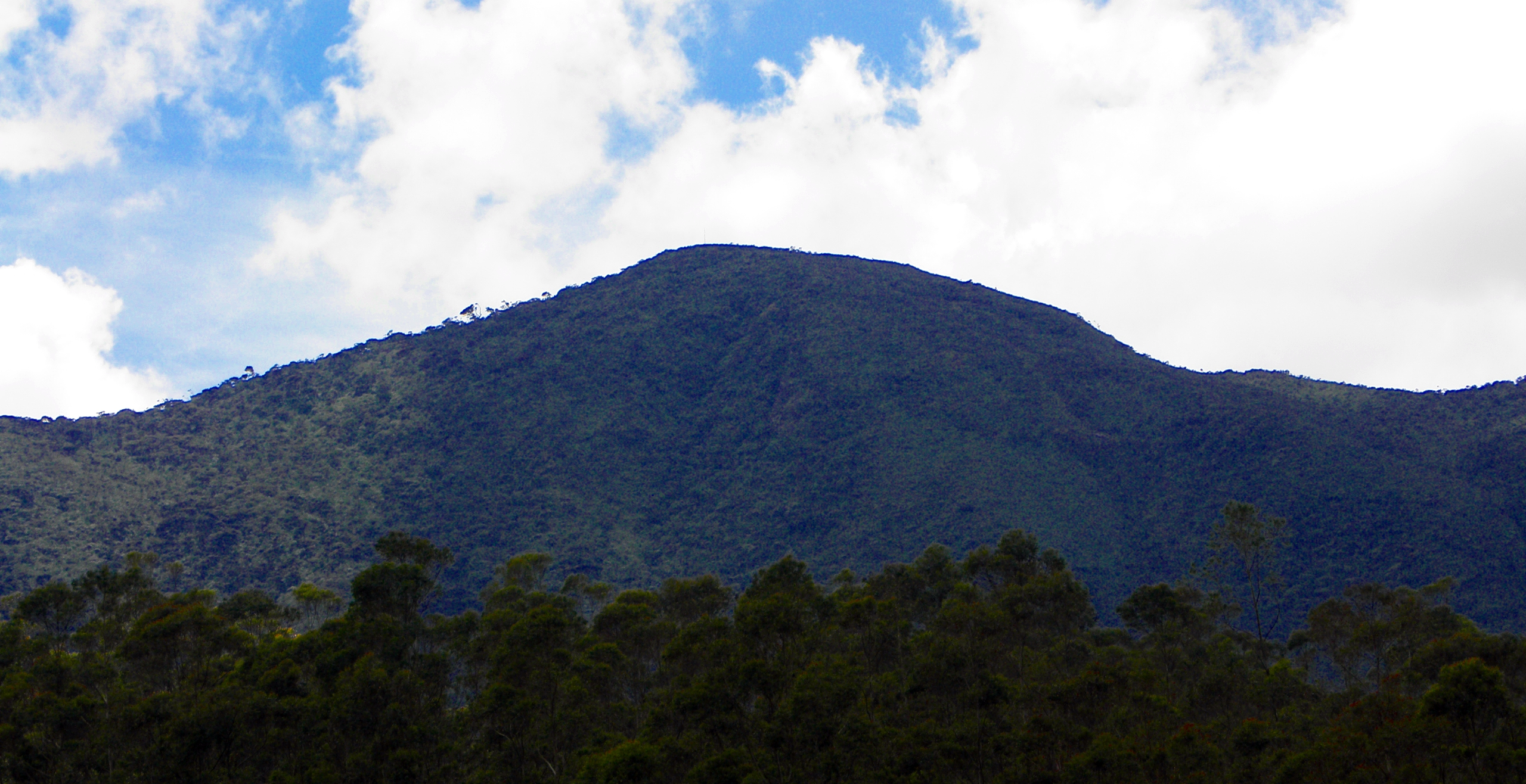 Thotupola Kanda, in Sri Lanka.